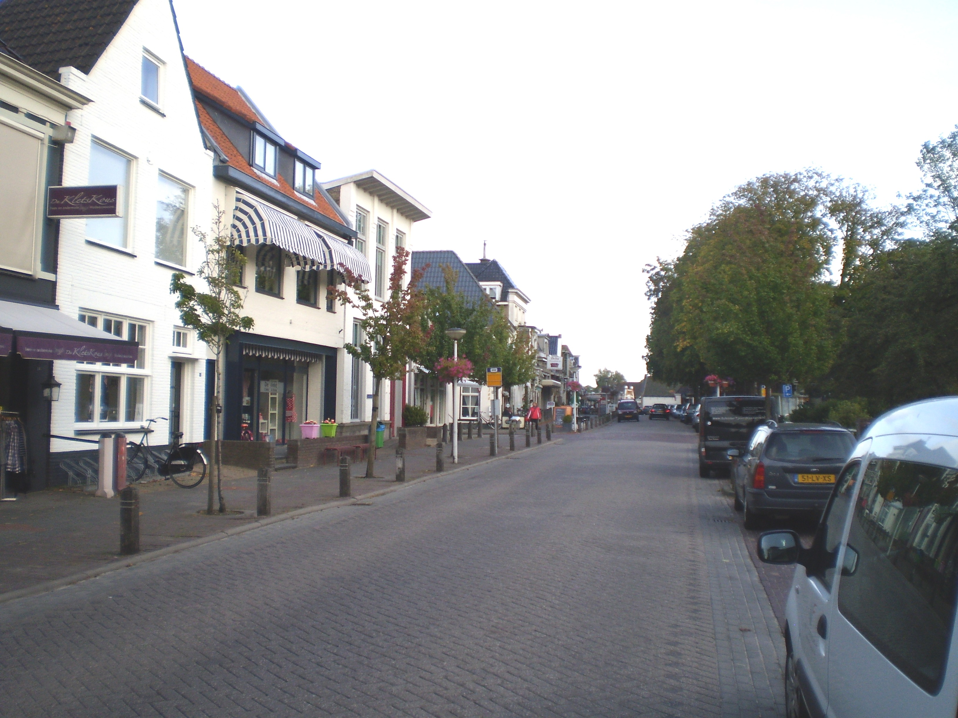 Heechein, Akkrum